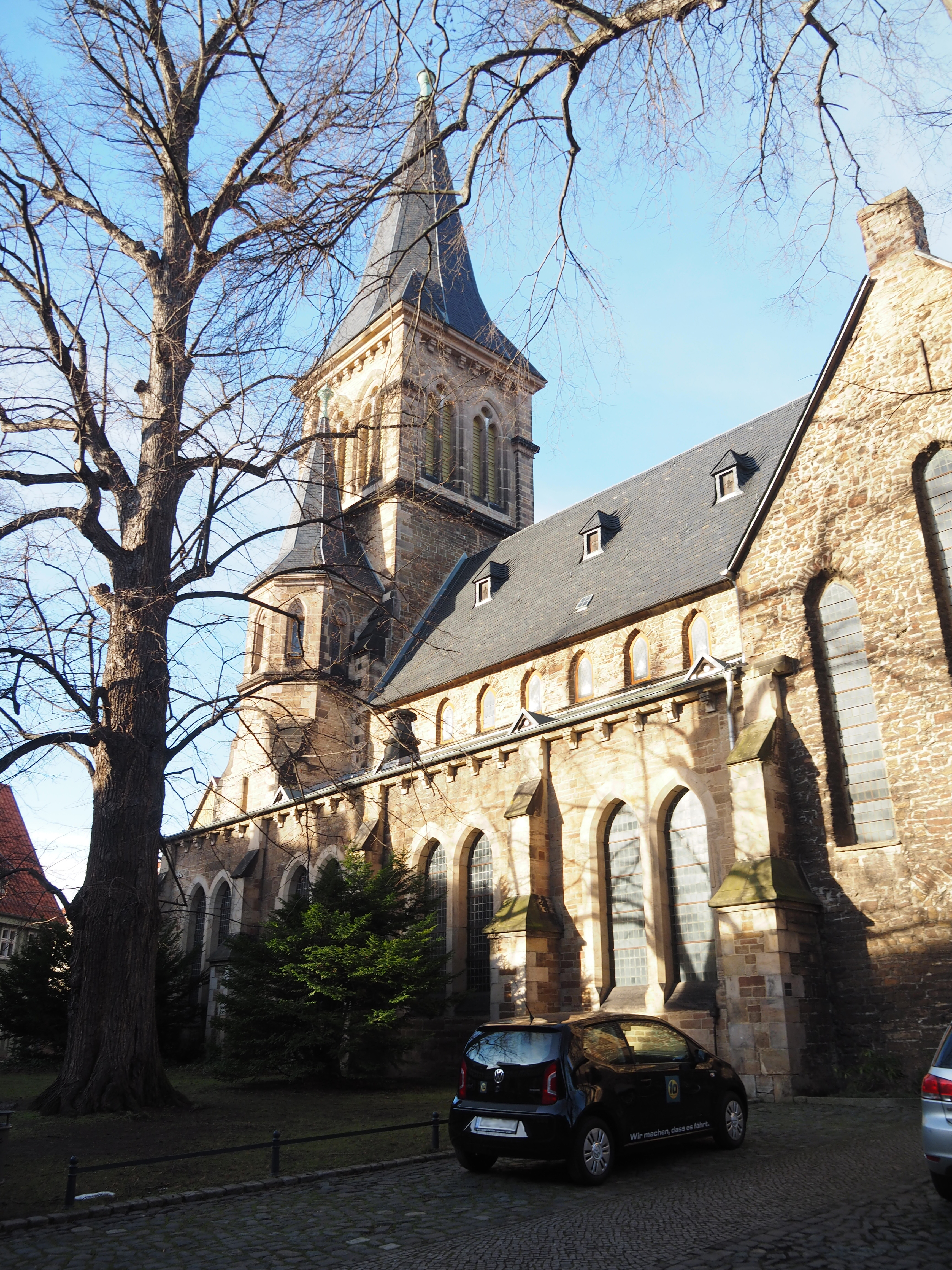 St. Sylvestri-Kirche, Wernigerode